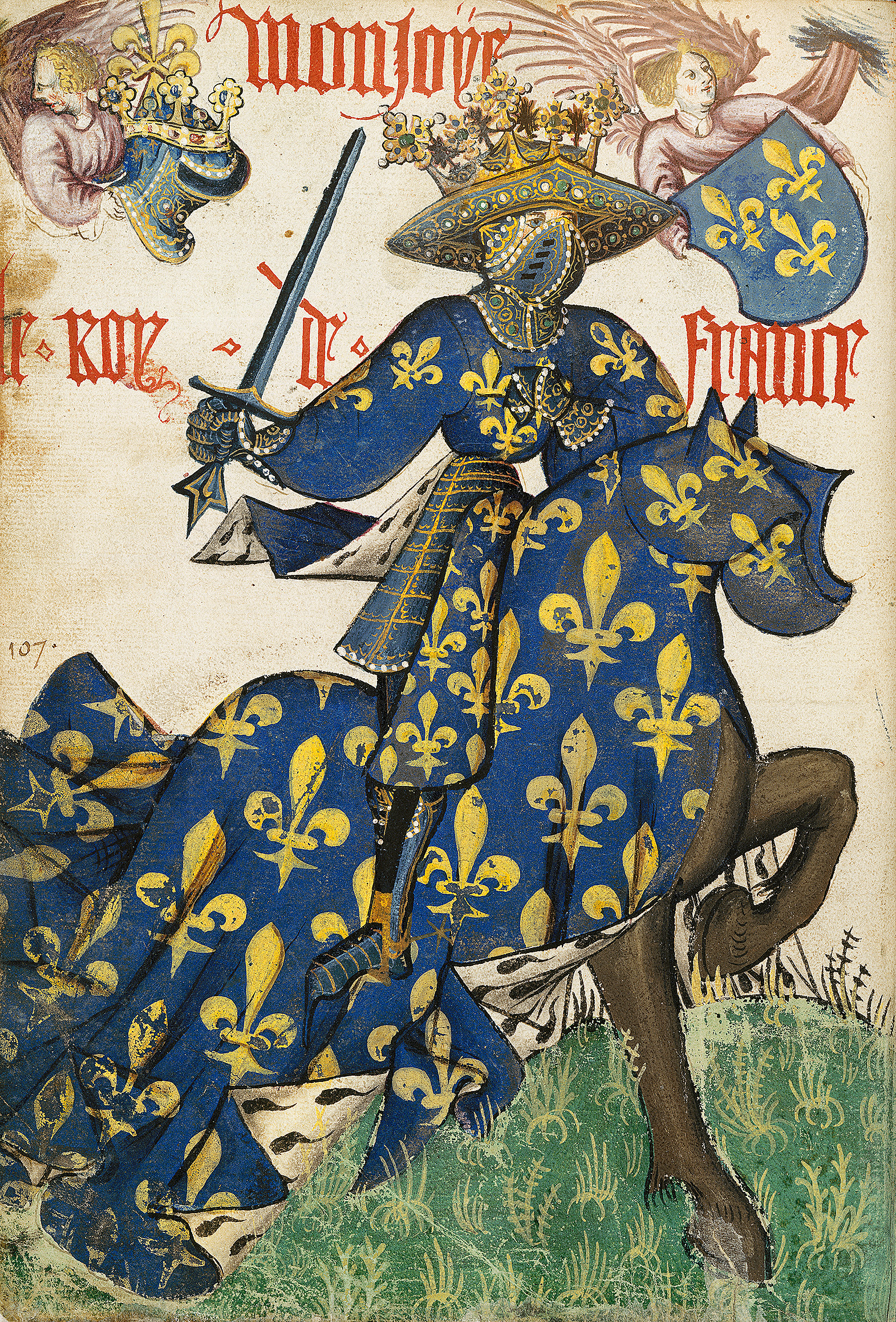 Armorial équestre de la Toison d'or, Flandre, ca. 1433-1435 - le Roi de France. folio 47v du manuscrit BNF Arsenal 4790